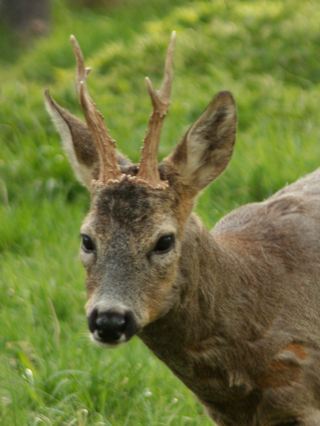 Capreolus capreolus